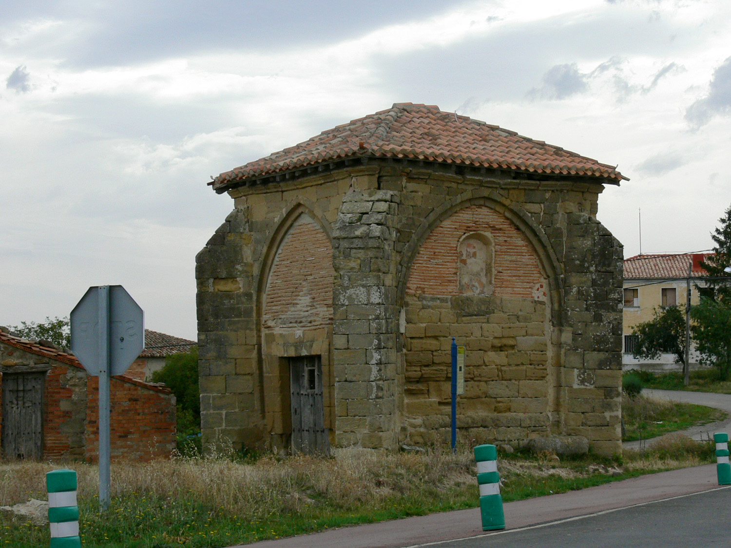 Ermita de los Judíos en Grañón, La Rioja - España.